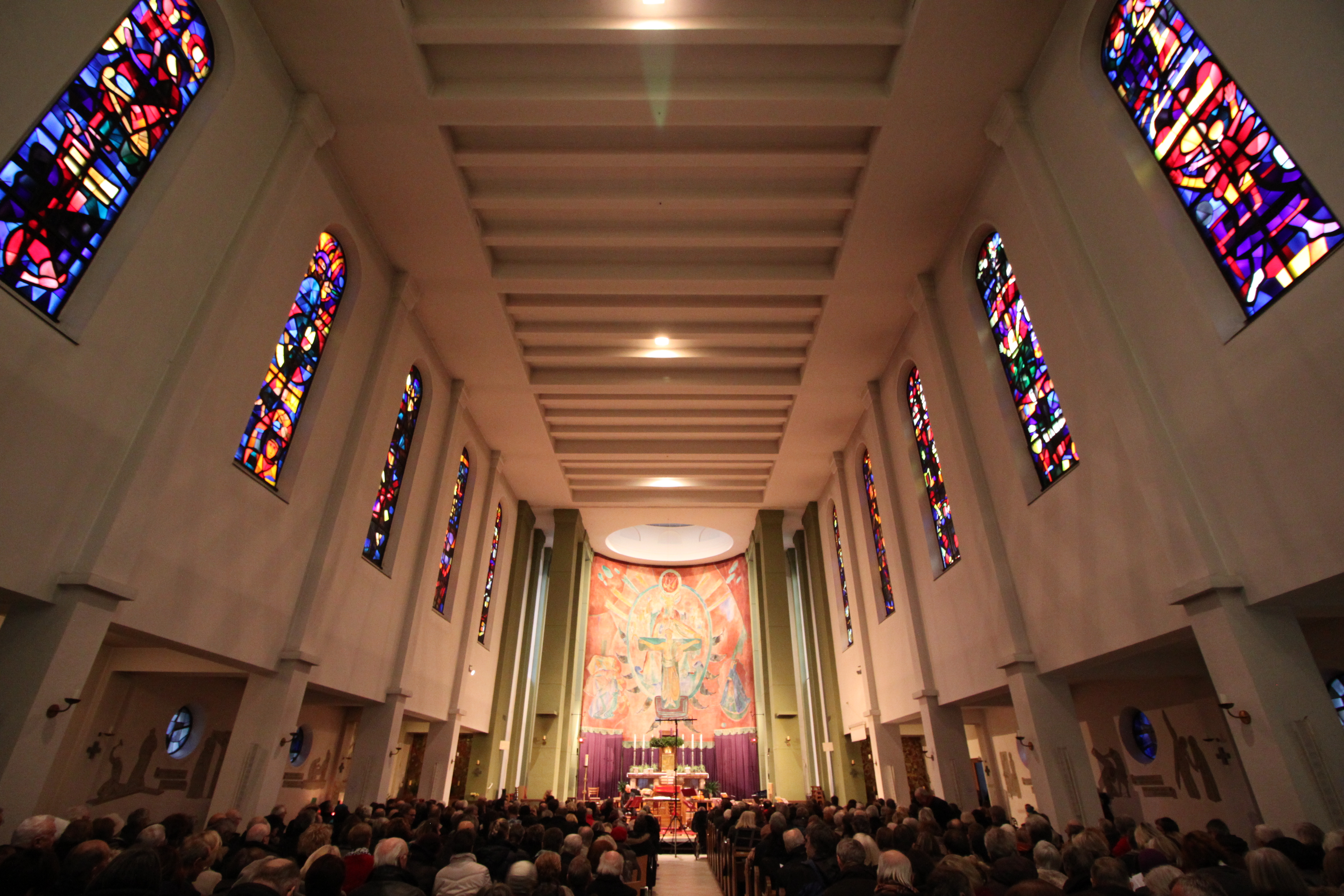 Kath. Pfarrkirche Christus König, im Langhaus zum Altarraum